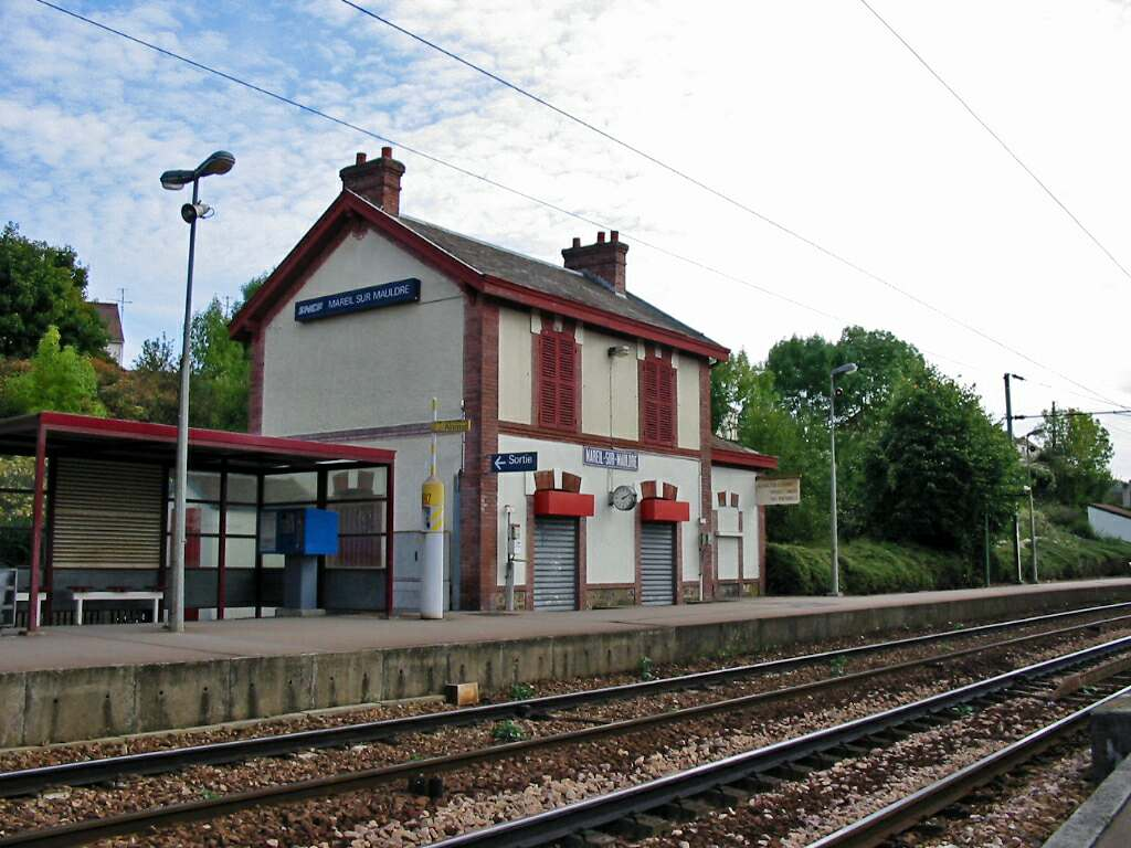 Gare de Mareil-sur-Mauldre (Yvelines) Photo JH Mora, octobre 2005 Mareil-sur-Mauldre catégorie:Image de Mareil-sur-Mauldre